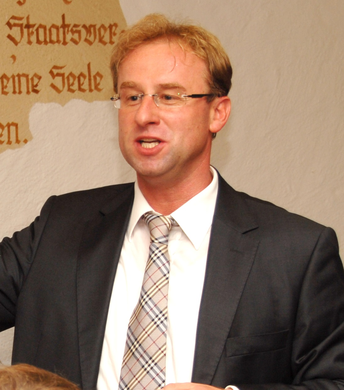 Wolfgang Fackler 2013